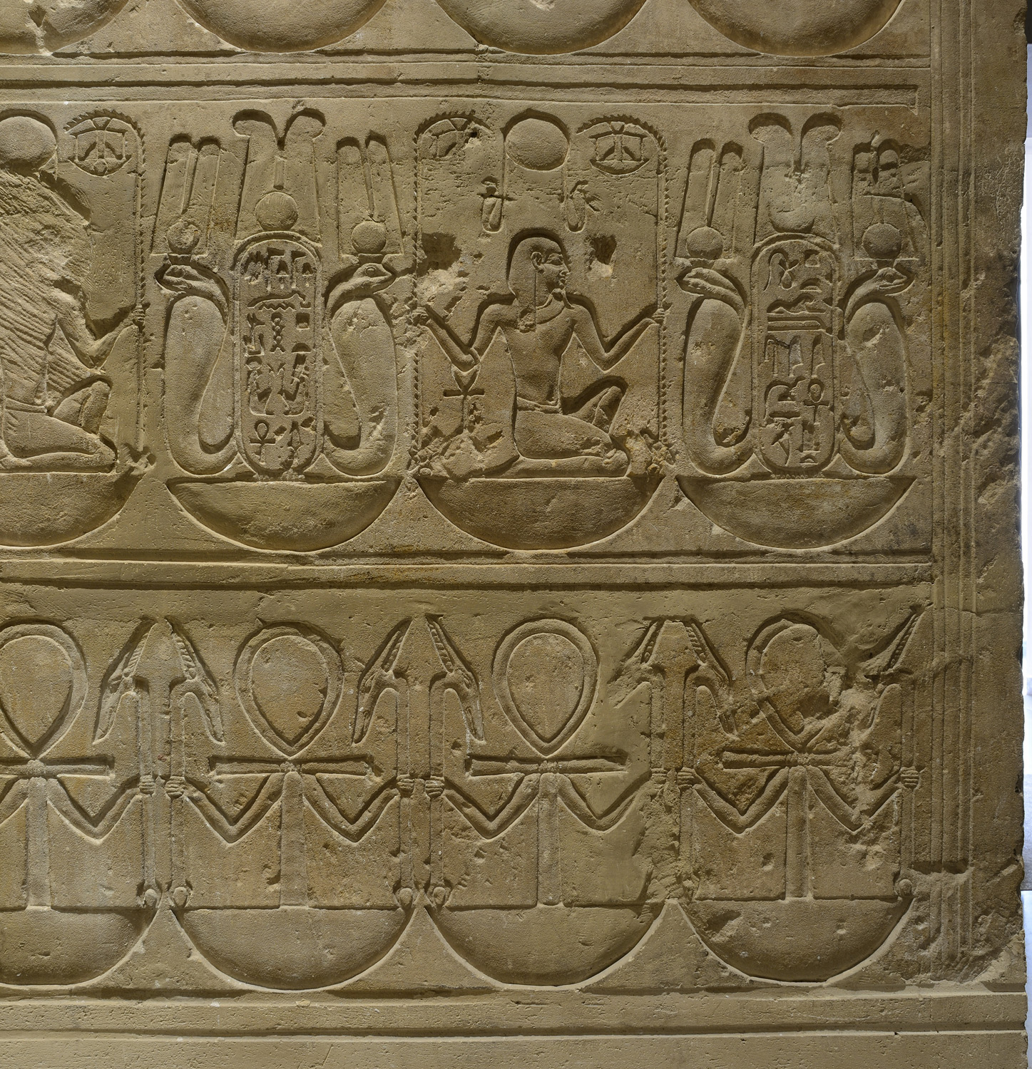 Portes de Médamoud détail